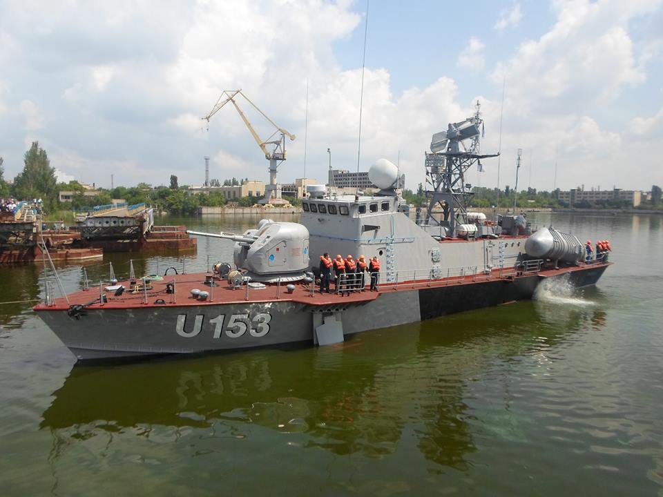 Ракетний катер «Прилуки» Військово-Морських Сил Збройних Сил України провів на рейді у Миколаєві перші ходові випробування, після початку ремонту. Корабель здійснив вихід з Миколаївського суднобудівного заводу ім. 61 Комунара, де його ремонтують, за допомогою буксиру «Зюйд», який люб’язно надали українським морякам миколаївський підприємець Михайло Козир та його комерційна фірма «О.О.Марконі». За словами заступника начальника Південної військово-морської бази, випробування катера пройшли в штатному режимі, і продемонстрували готовність корабля до подальших дій. На Миколаївському суднобудівного заводу ім. 61 Комунара, стверджують що основний цикл ремонтних робіт вже завершено, і наразі катер «Прилуки» очікують подальші ходові випробування. За планом ремонт має завершитися через місяць до початку міжнародних військових навчань «Сі Бриз-2016» в яких запланована участь катеру «Прилуки».